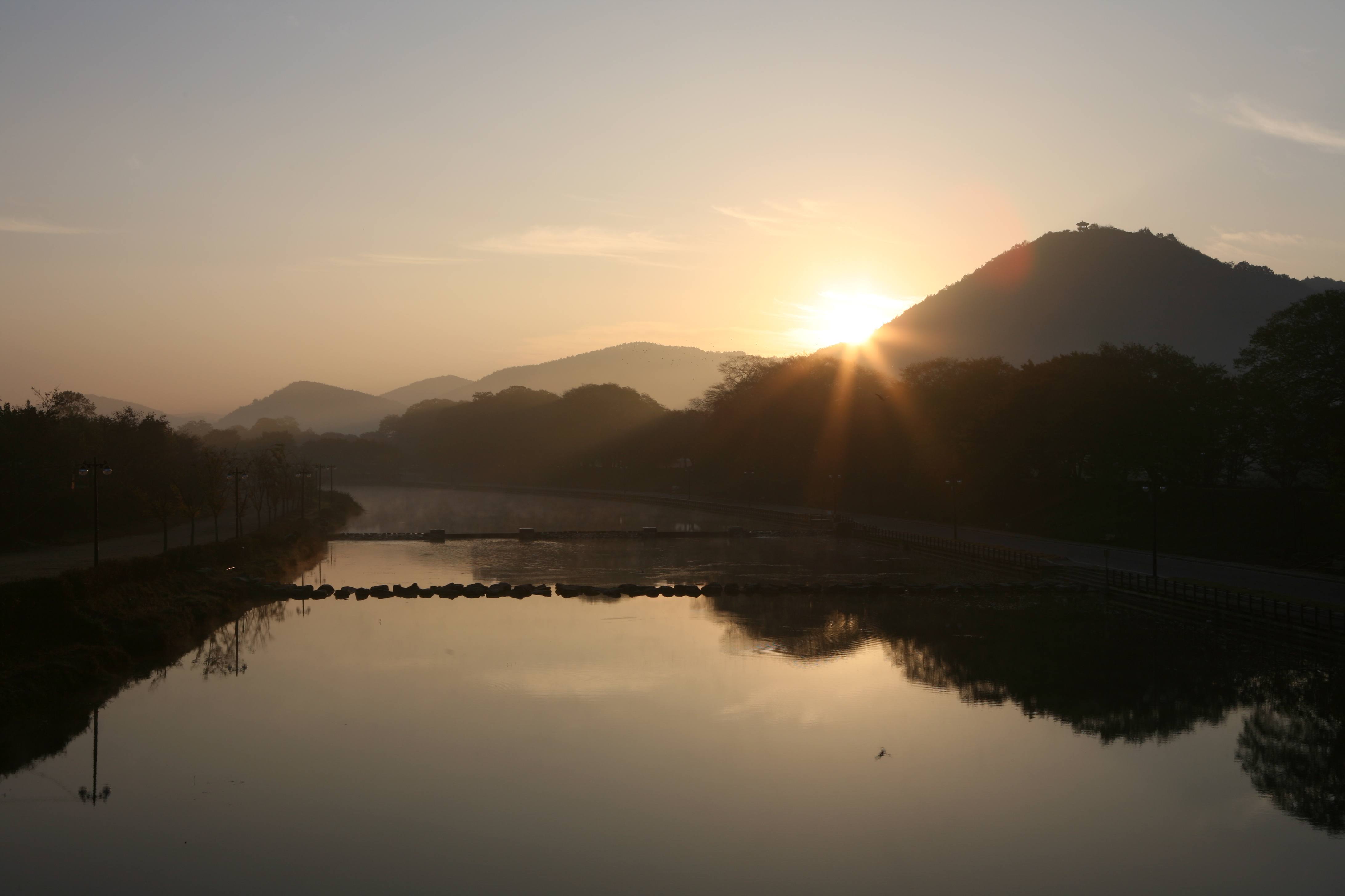 담양 영산강